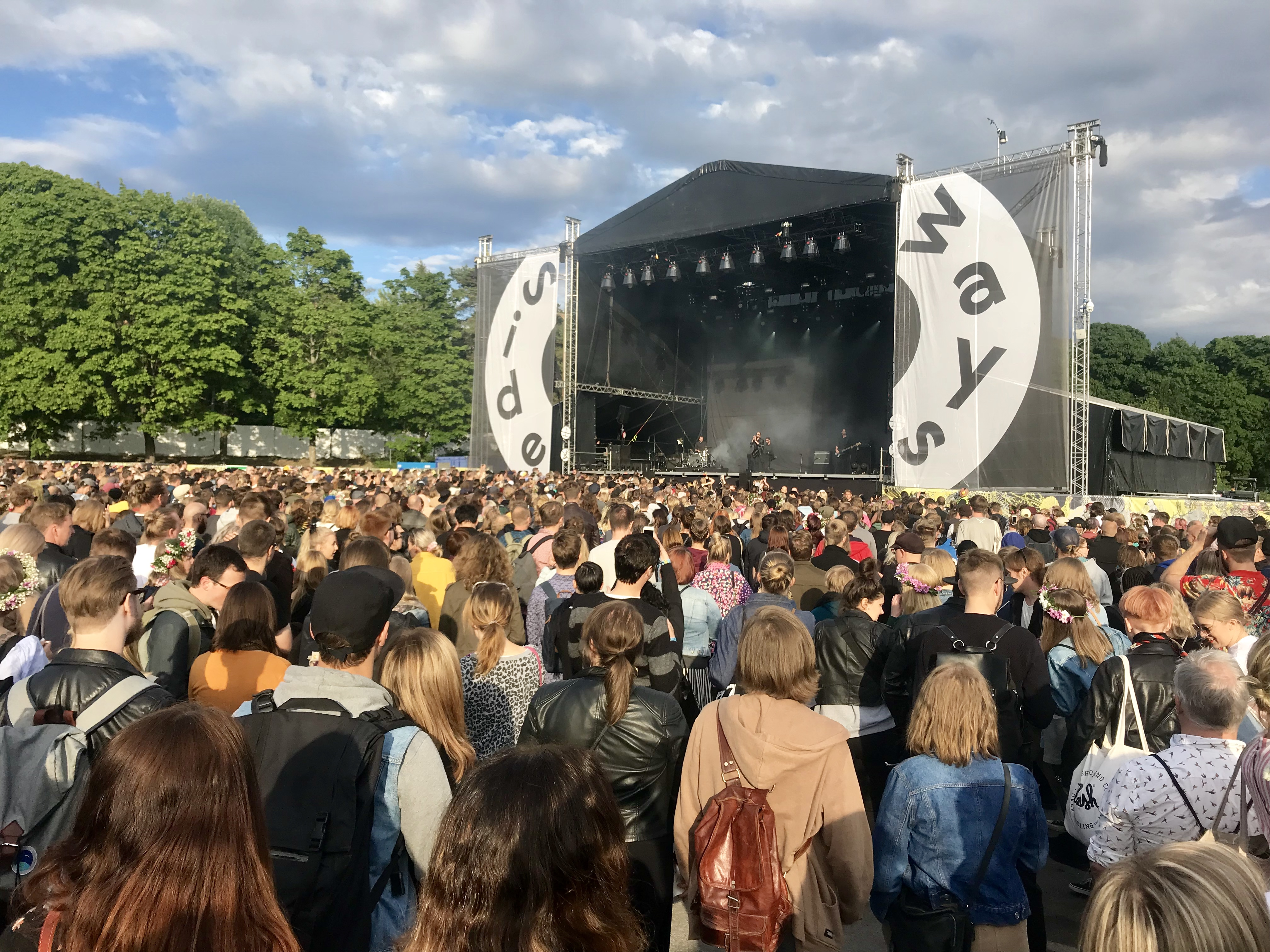 Helsinki, Suomi, kesäkuuta 2018